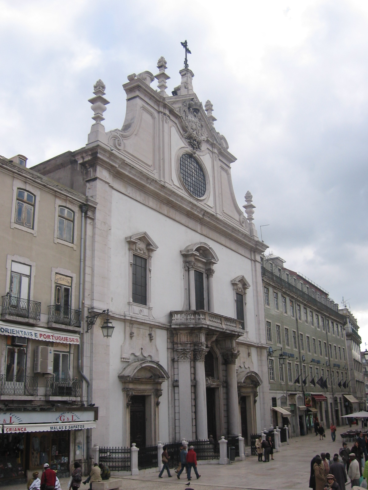 Igreja de São Domingos, Lisboa, Portugal